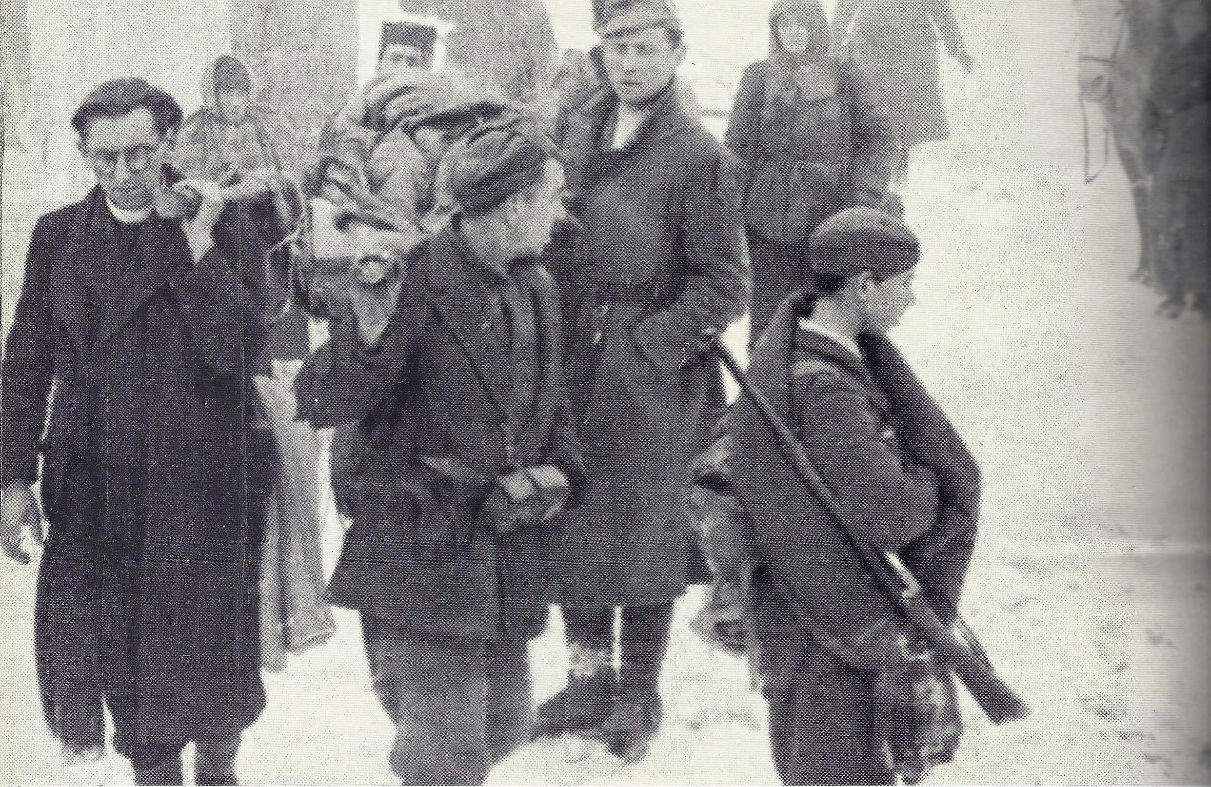 Prenos ranjencev 14 divizije na Paškem Kozjaku 19. februarja 1944. Prvi z leve je verski referent divizije Jože Lampret.